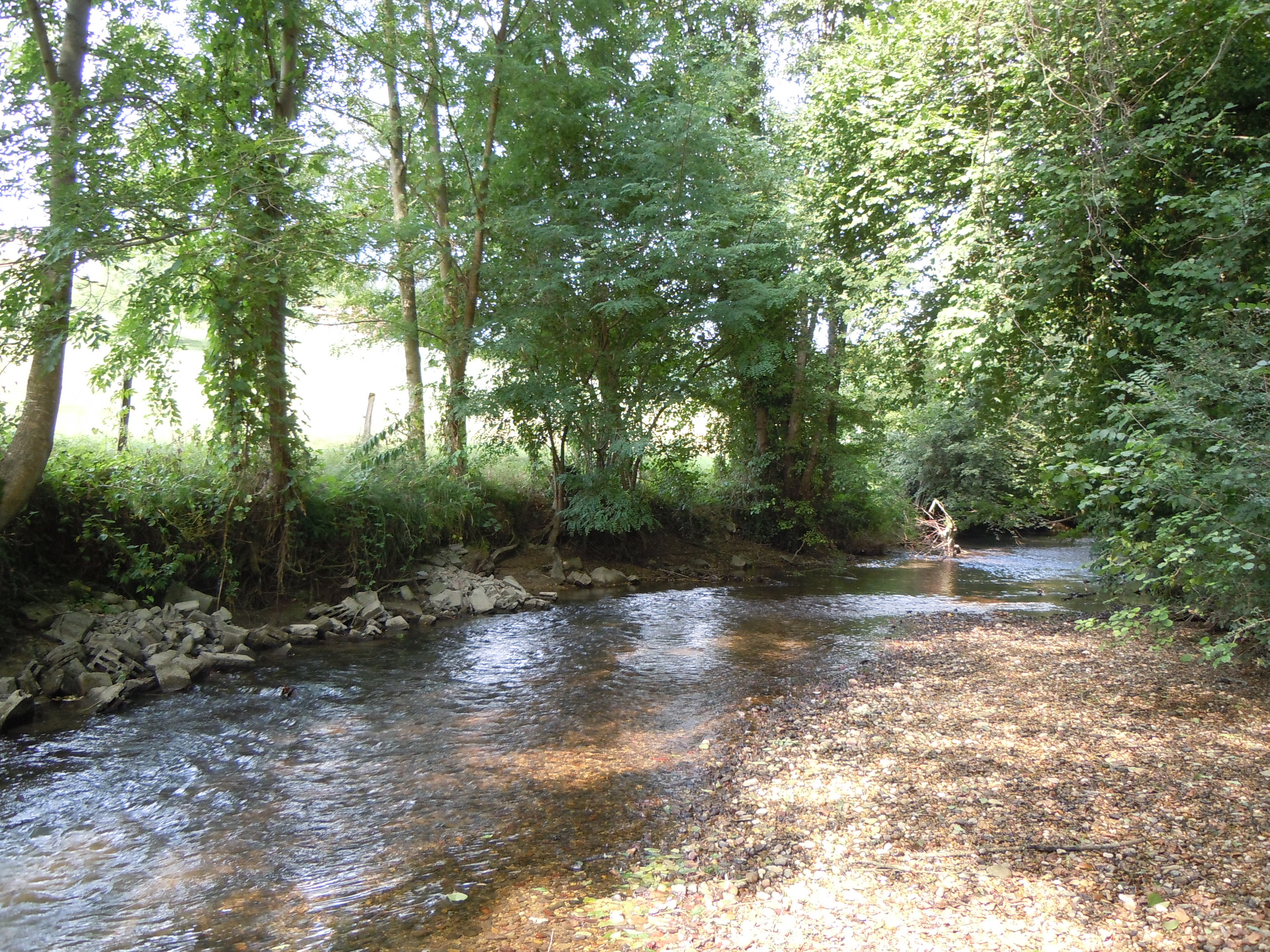 Le Thier à Belmont- Tramonet, Marais des Chaudannes, Savoie, France